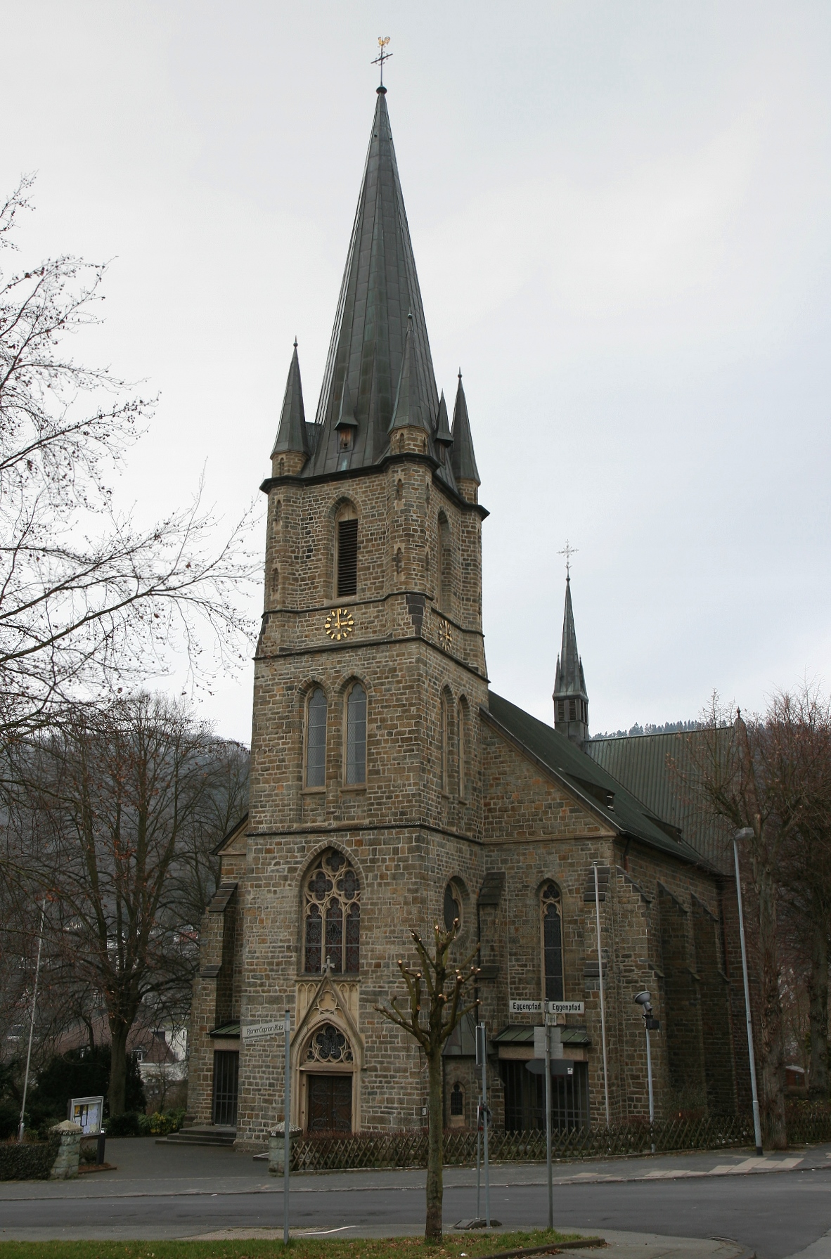 Katholische Kirche St. Michael in Werdohl. Neugotische Hallenkirche, erbaut 1900/1901, Denkmal.